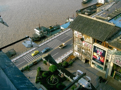 洪崖洞